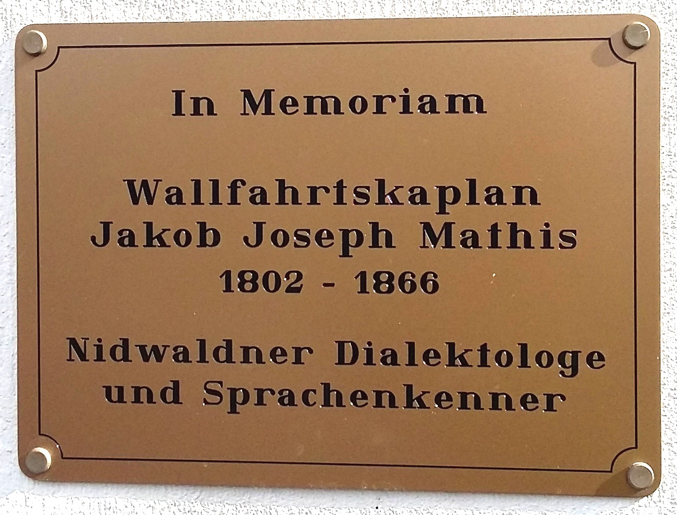 Gedenktafel für den Kaplan, Dialektologen und Sprachenkenner Jakob Joseph Matthys (1802–1866) in Maria-Rickenbach, Nidwalden